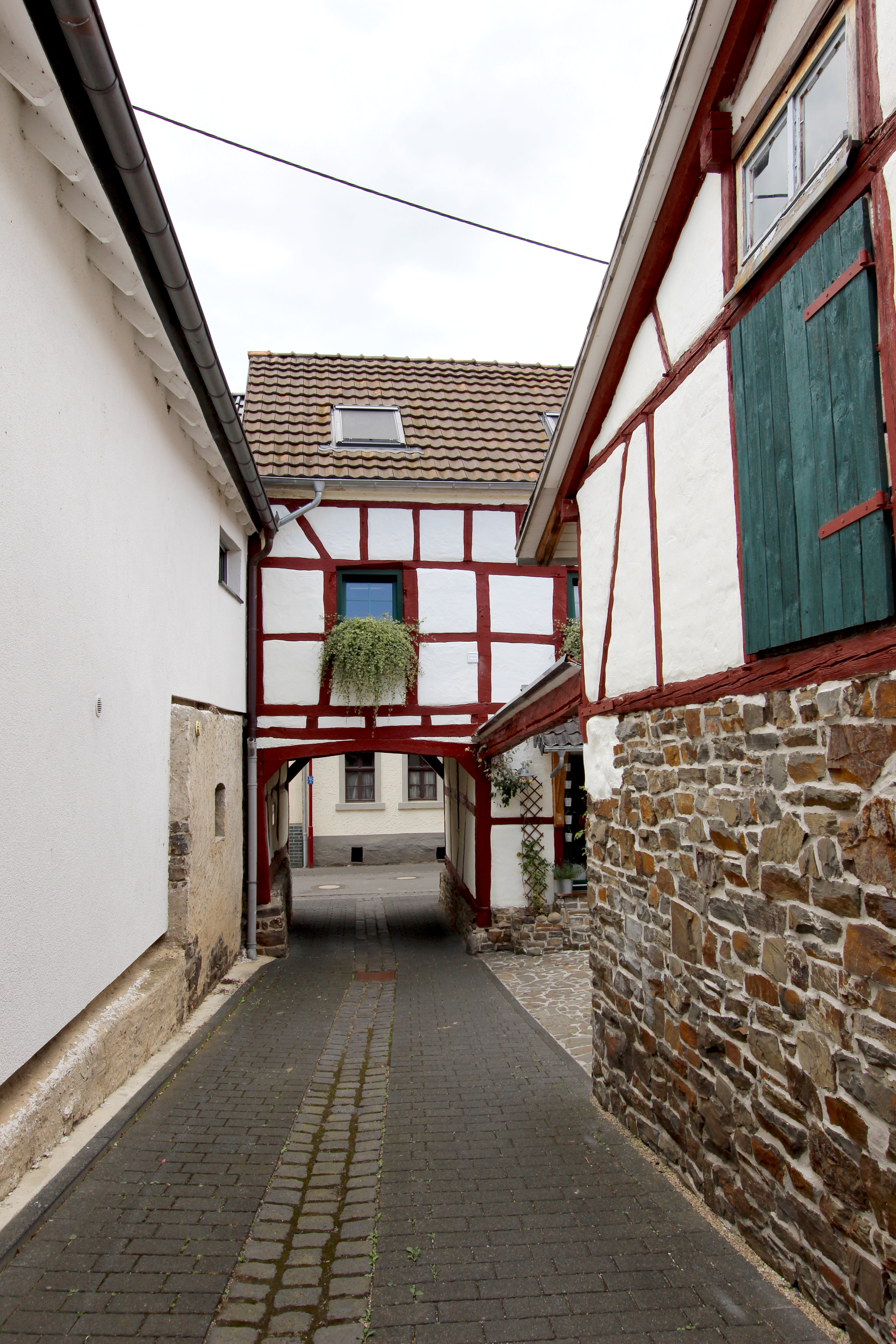 53506 Hönningen, Hauptstraße. Restaurierte Fachwerkfassaden. Aufnahme von 2017.